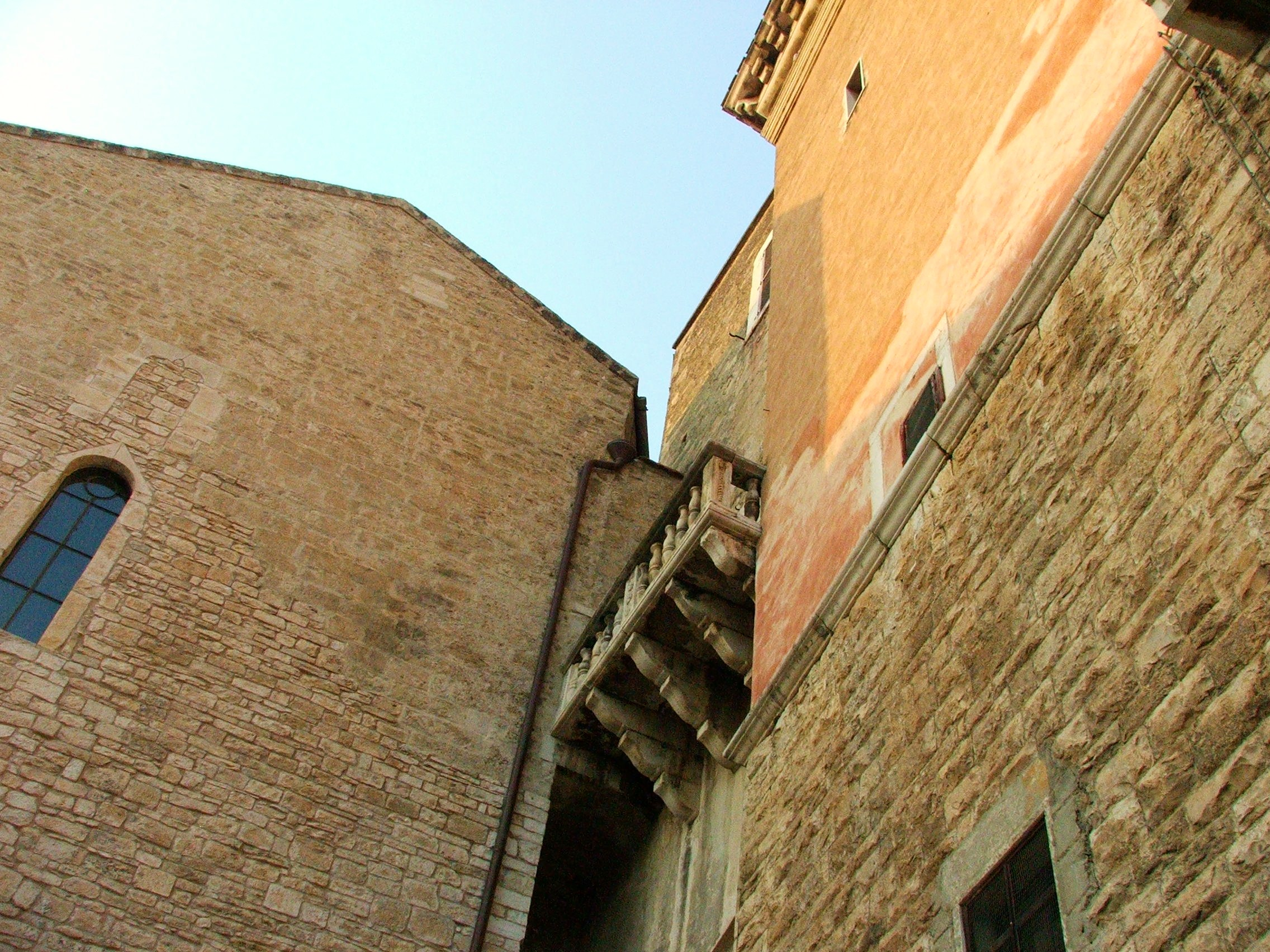 Punto di congiunzione tra il potere temporale e quello spirituale. Il passaggio dal palazzo ducale alla cattedrale della città di Andria era possibile attraverso alcune stanze interne.